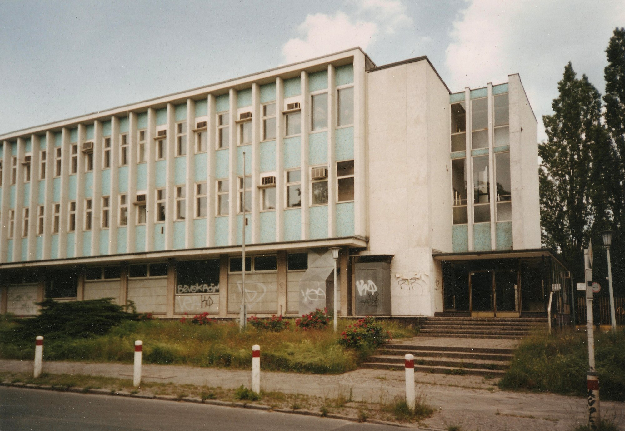 Ehemalige Coca-Cola-Niederlassung in der Hildburghauser Straße 224 in Berlin-Lichterfelde, bekannt aus dem Film Eins, Zwei, Drei (One, Two, Three).